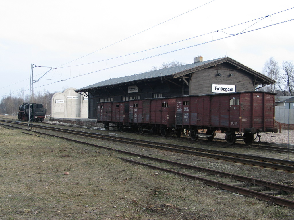 Stacja Radegast w Łodzi